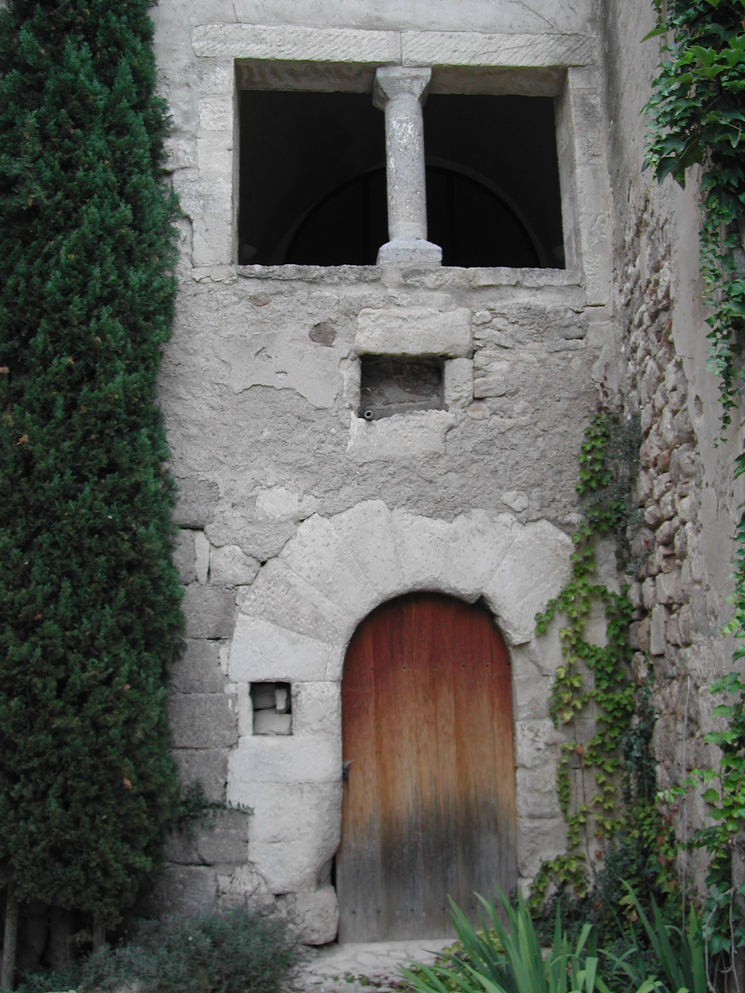 Façade de l'ancienne synagogue